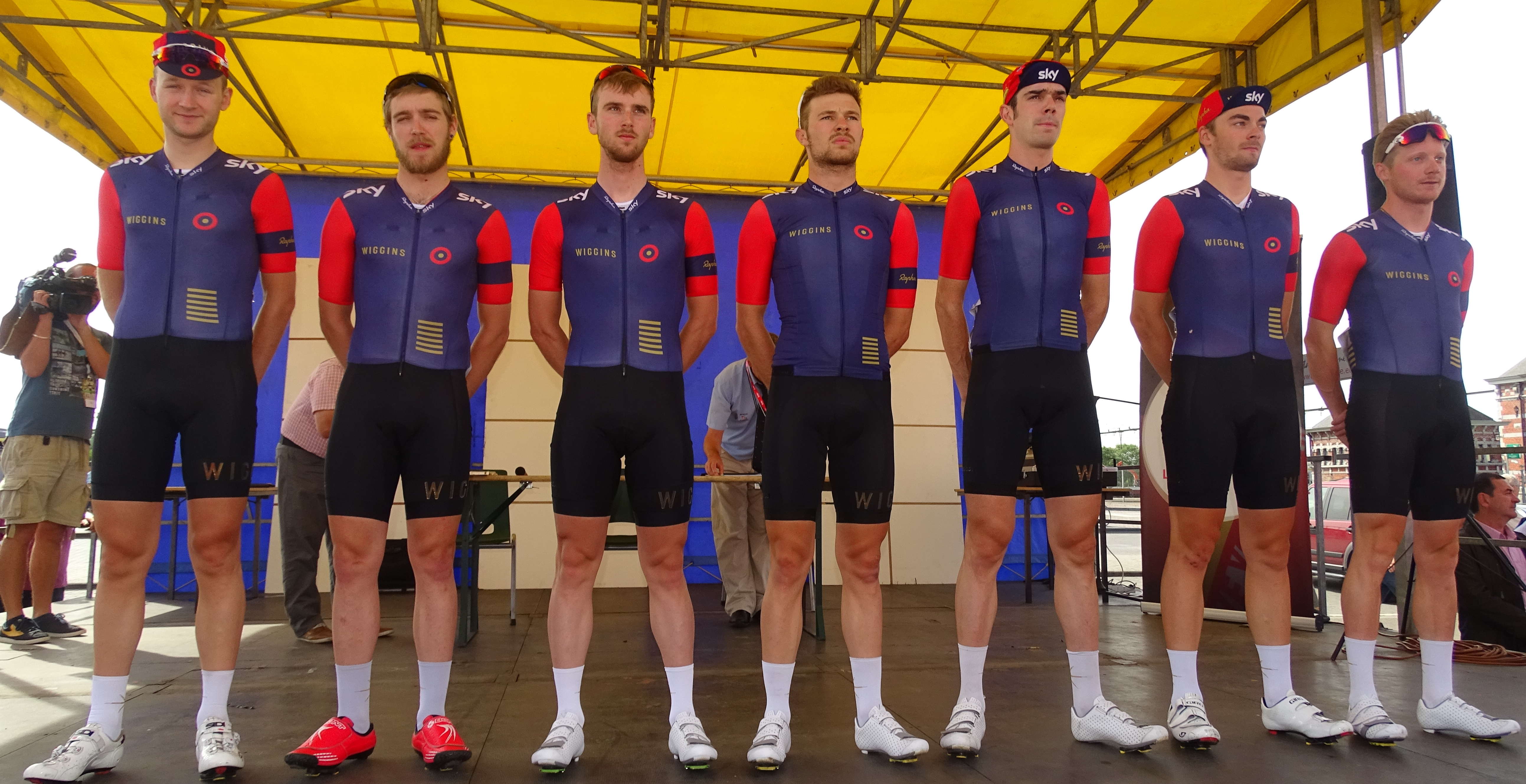 Reportage réalisé le mercredi 22 juillet à l'occasion du départ du Grand Prix Pino Cerami 2015 à Saint-Ghislain, Belgique.